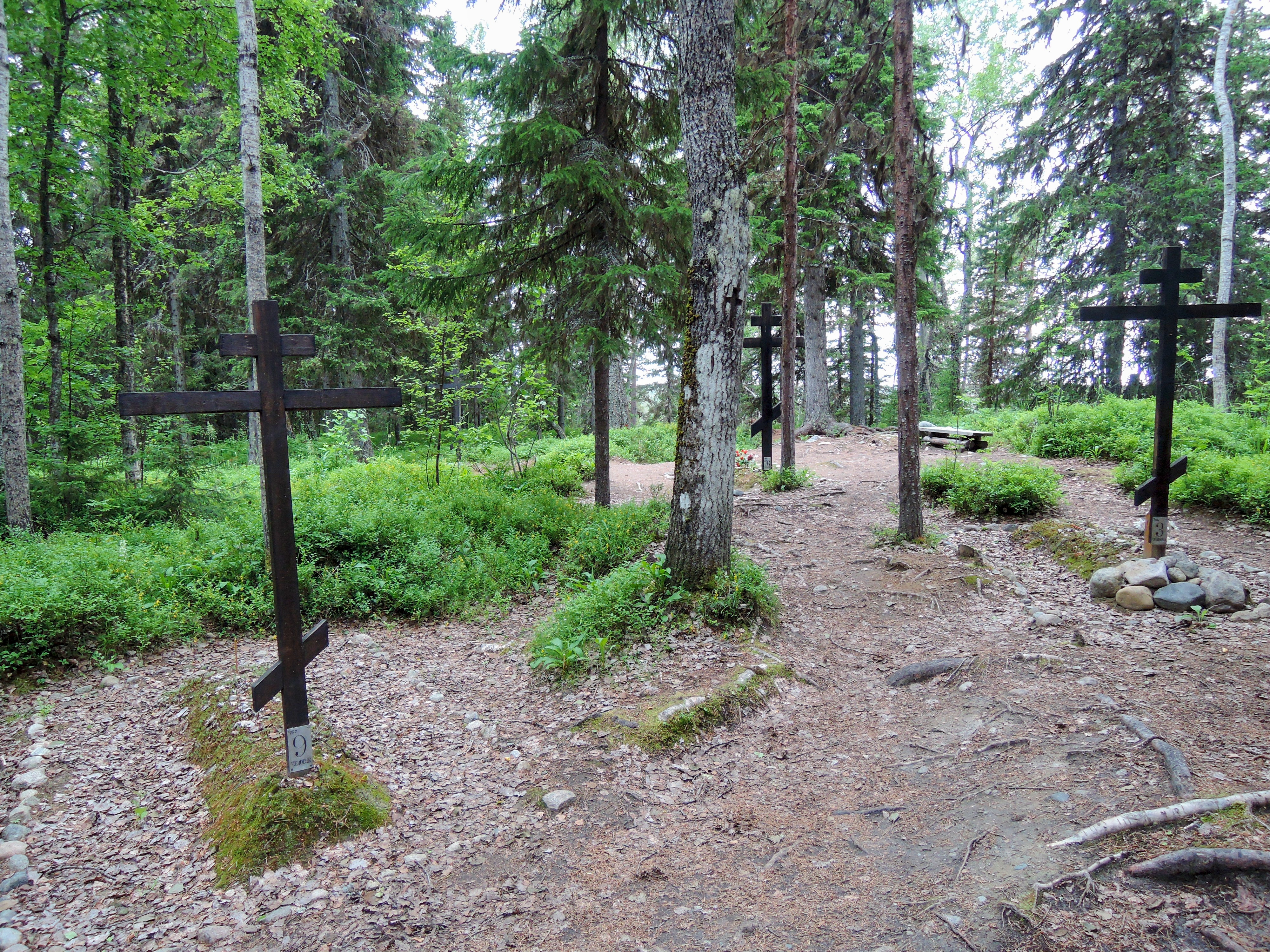 Masové hroby na úpatí Sekirné hory (Solovecký ostrov)